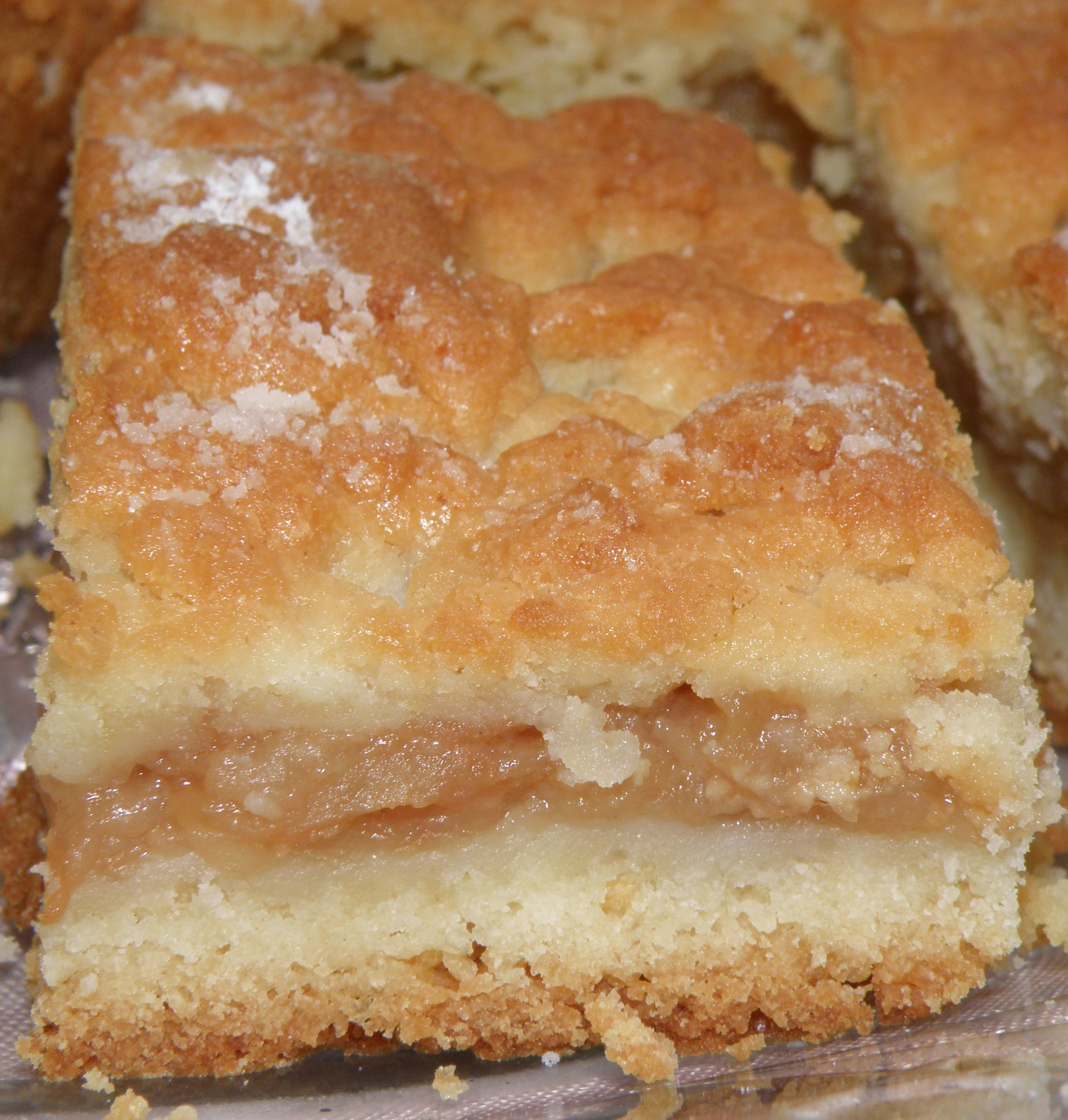 Szarlotka